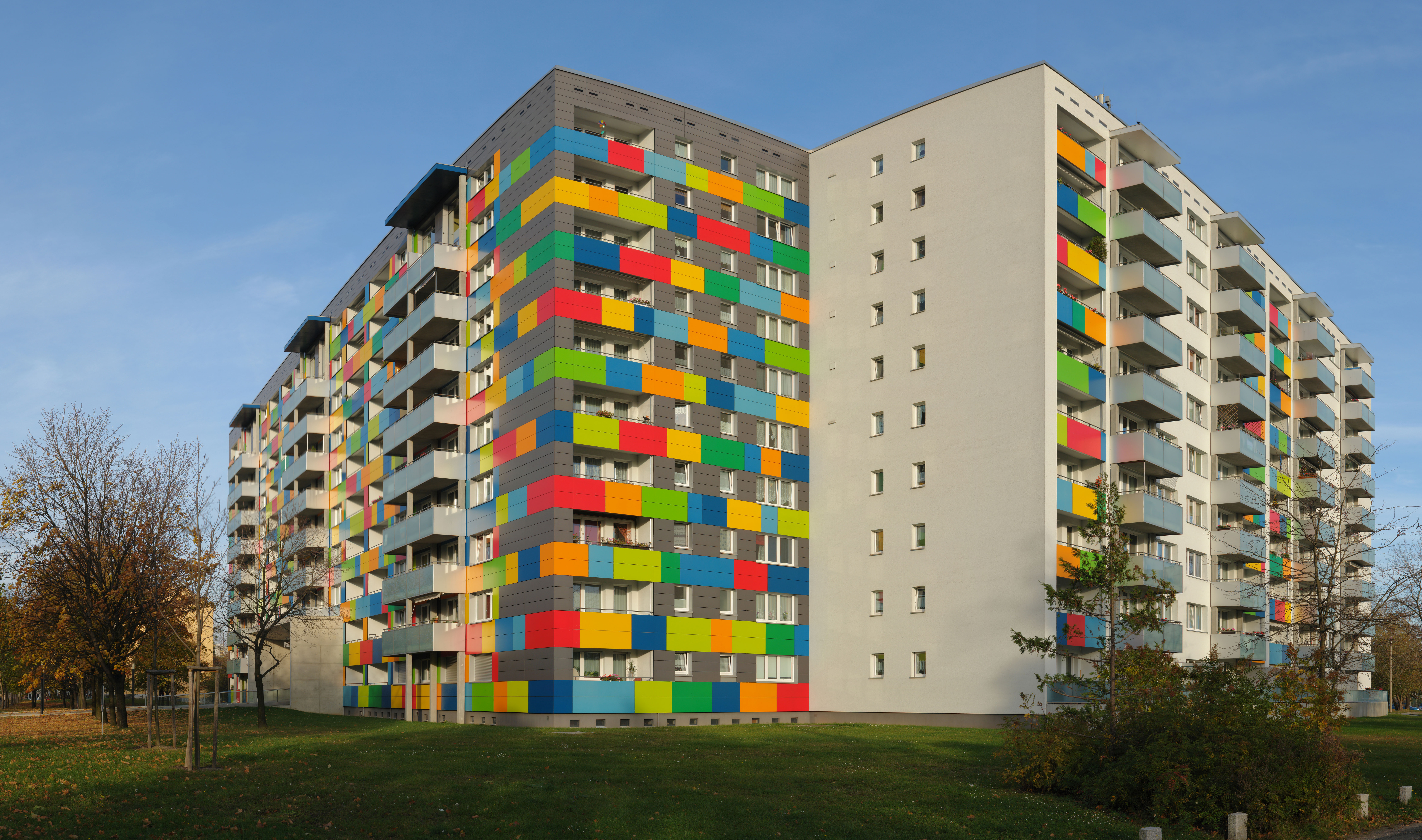 sanierter Plattenbau Marschnerstraße 15-27 Dresden scheinbar Deformationen durch den Stitcher